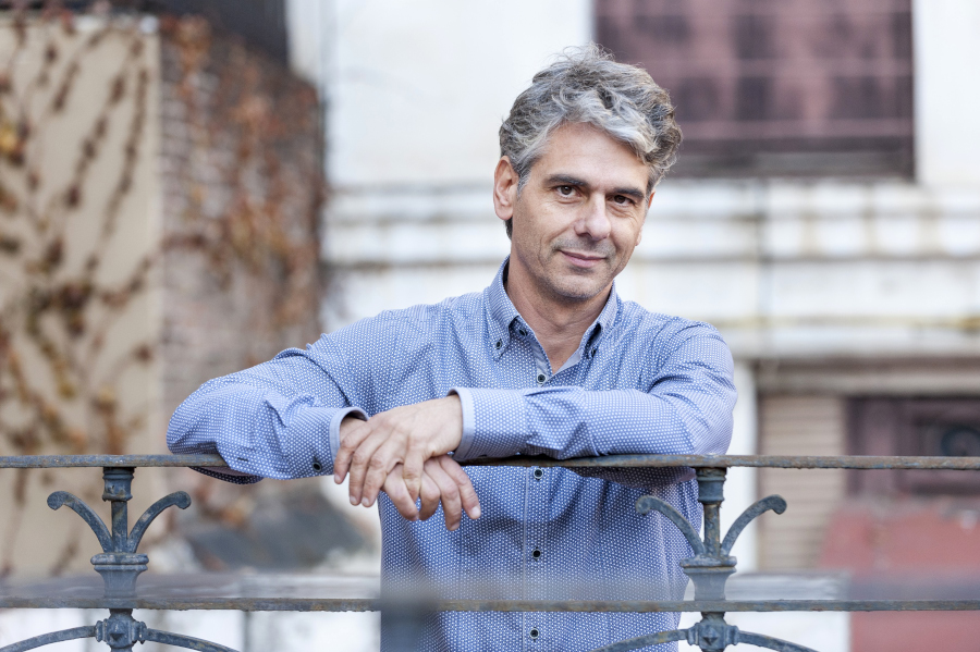 56è premi Sant Jordi de novel·la_Pep Puig_La vida sense la Sara Amat_BAIXA RES_Foto Òmnium Dani Codina 65a Nit de Santa Llúcia Tortosa ha acollit la nit de les #lletrescat de l'any 2015.